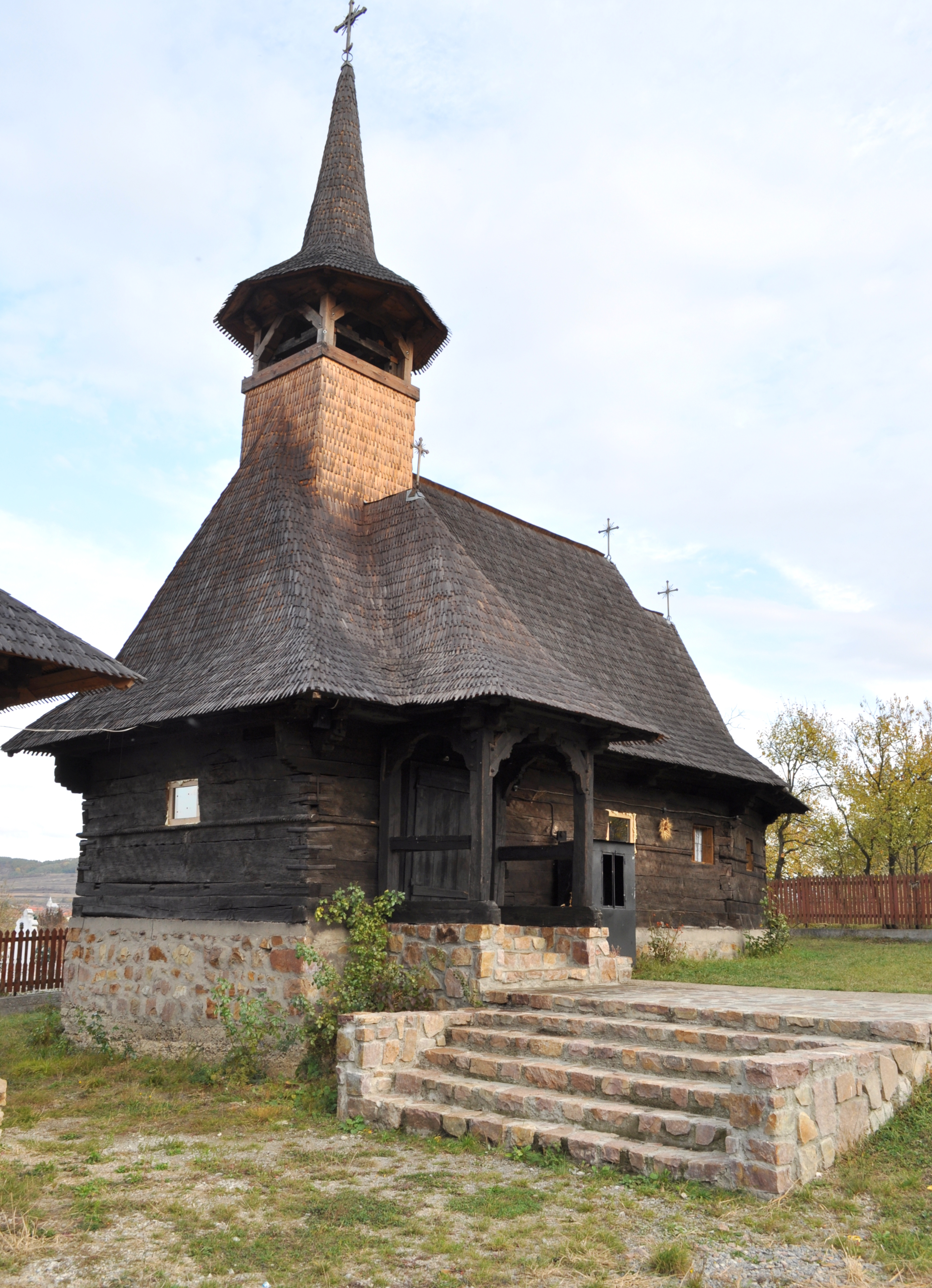 Biserica de lemn „Sf. Teodor Tiron" din Brătești, județul Bihor